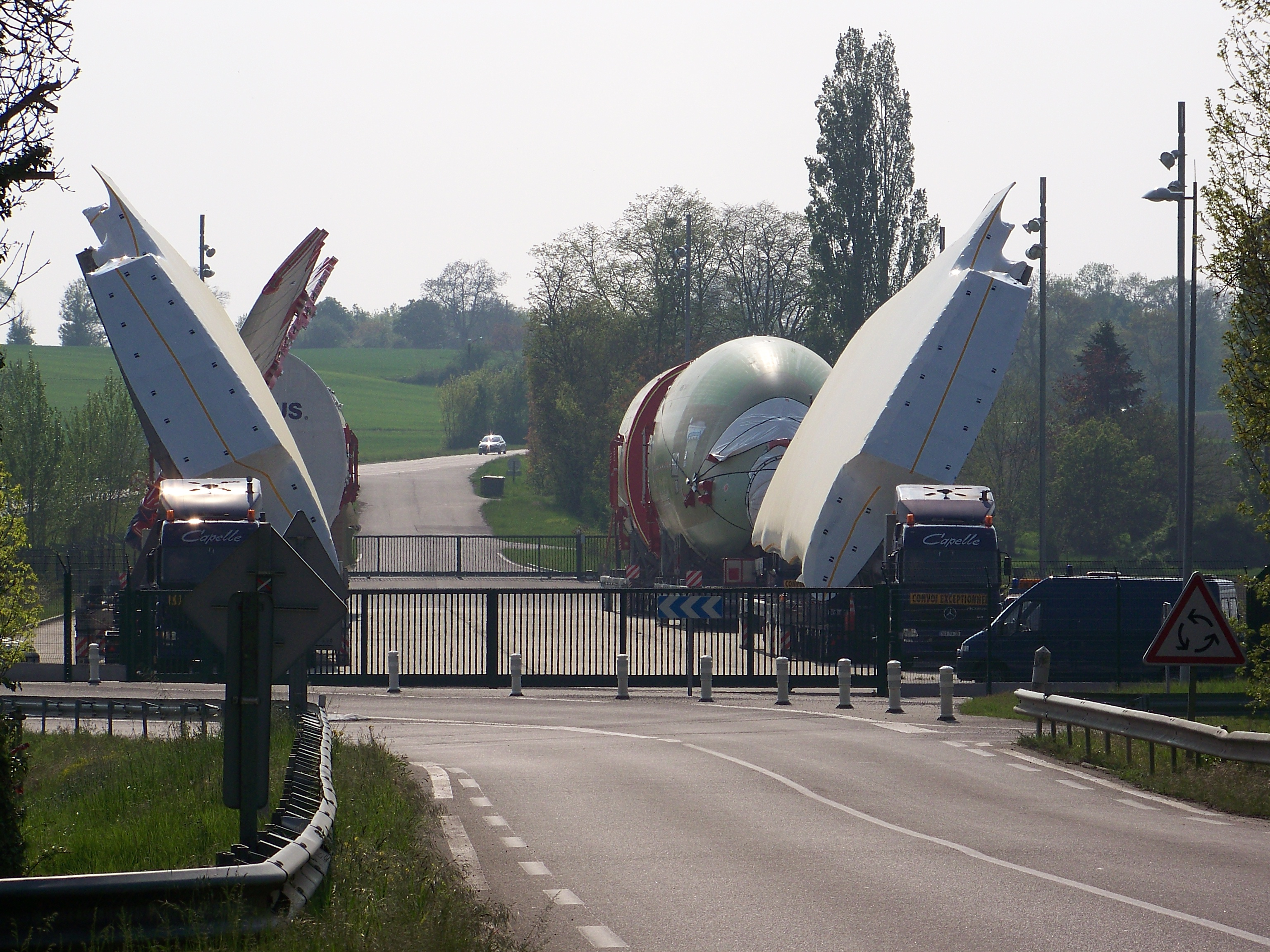 Convoi de l'A380 en attente sur la aire de L'Isle-Jourdain de rétention de l'Itinéraire à Grand Gabarit